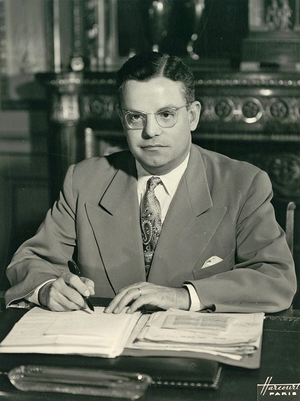 Recueil. Portraits de Louis-Paul Aujoulat, ministre de la Santé publique et de la population (XXe s.)